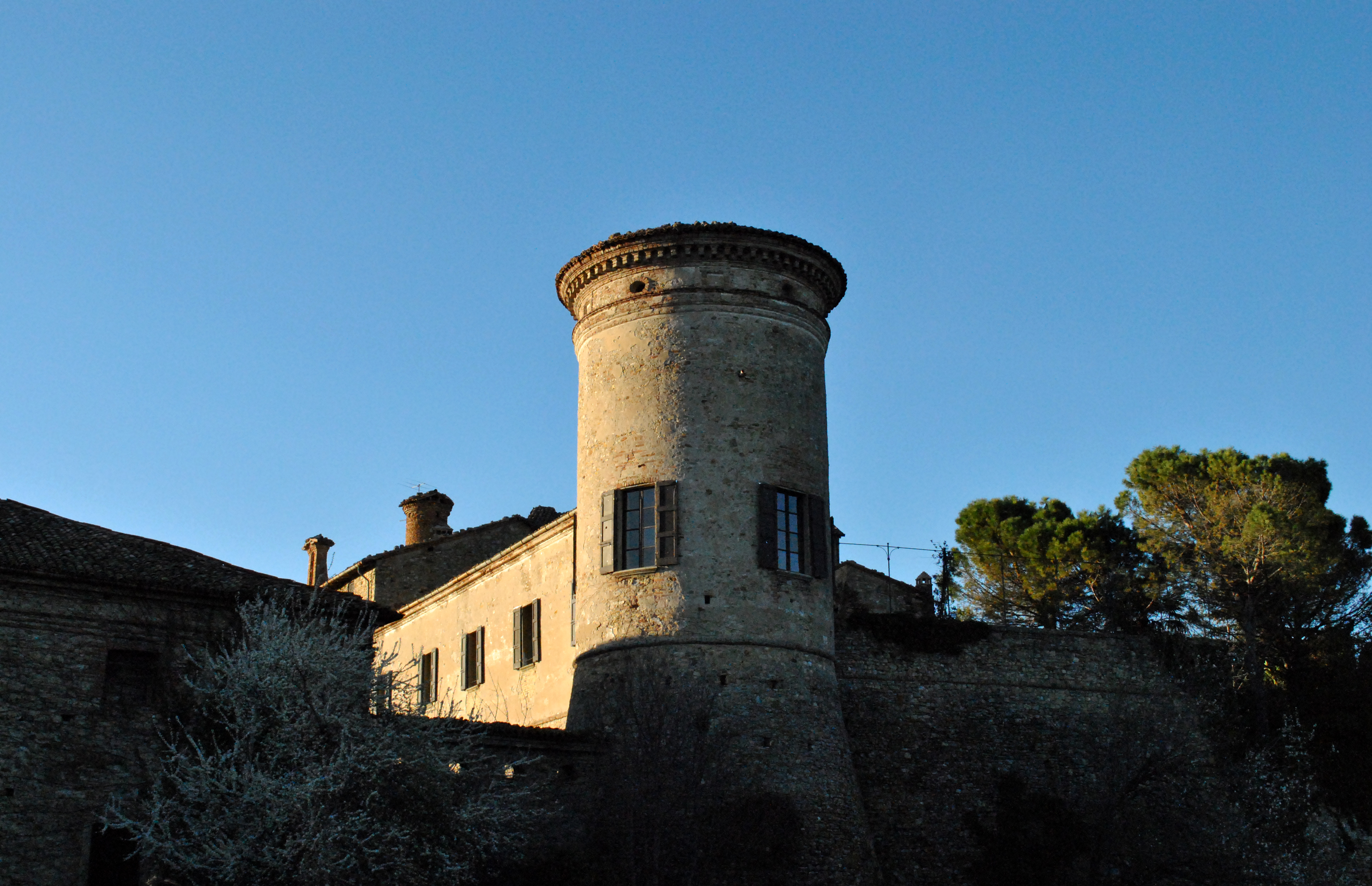 Castello di Scipione dei Marchesi Pallavicina - MIBAC This is a photo of a monument which is part of cultural heritage of Italy.